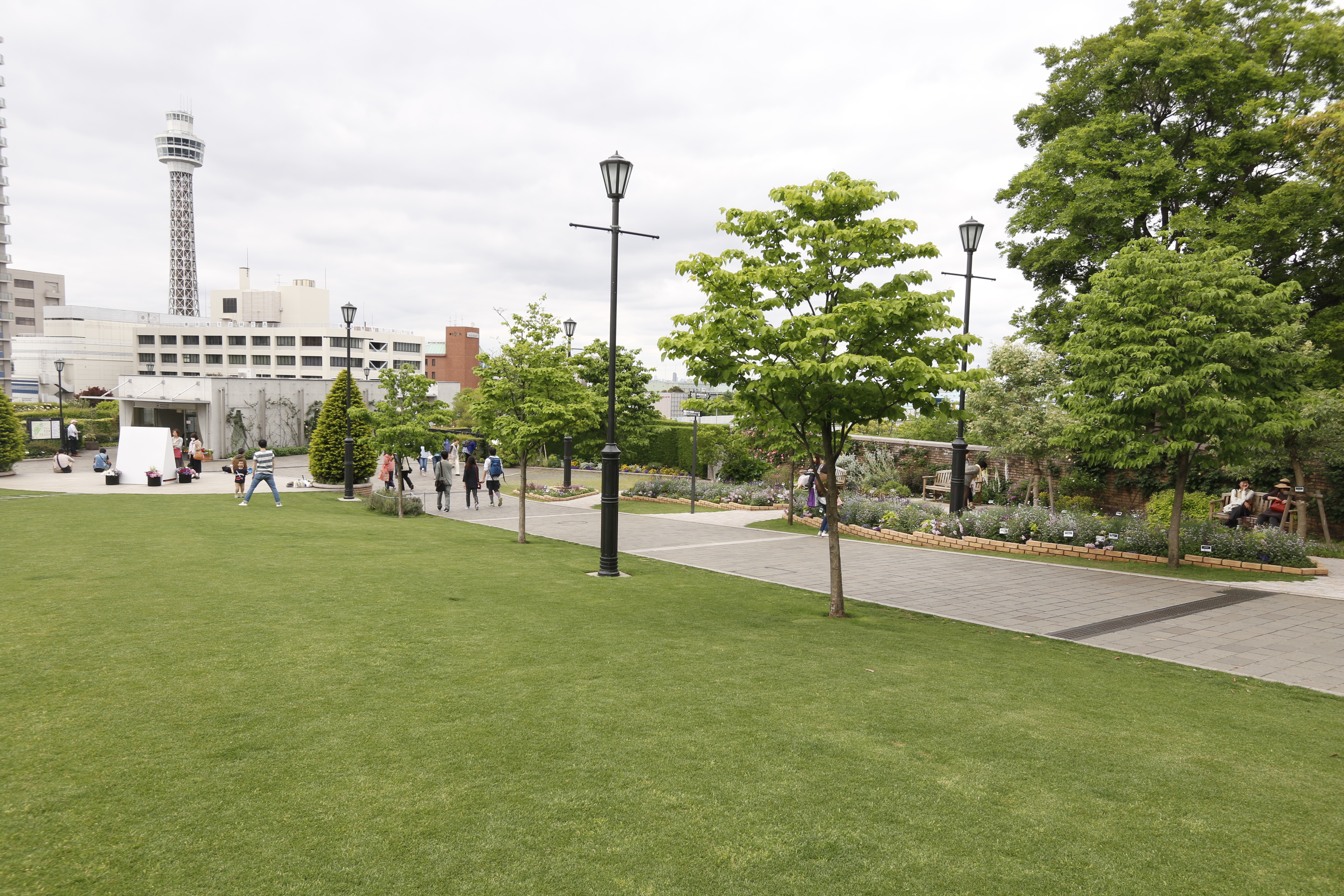 元町貝塚発掘調査区付近の現況